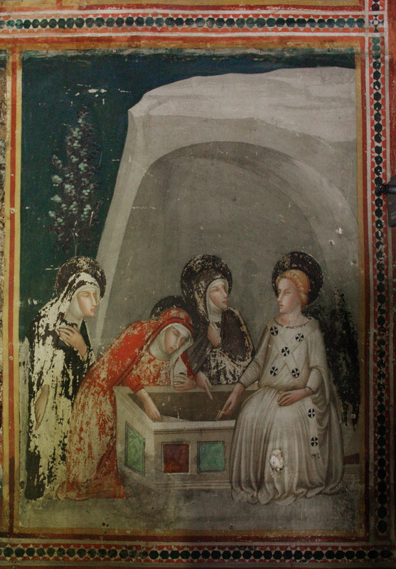 Escena de les Tres Maries a la tomba buida de Jesús